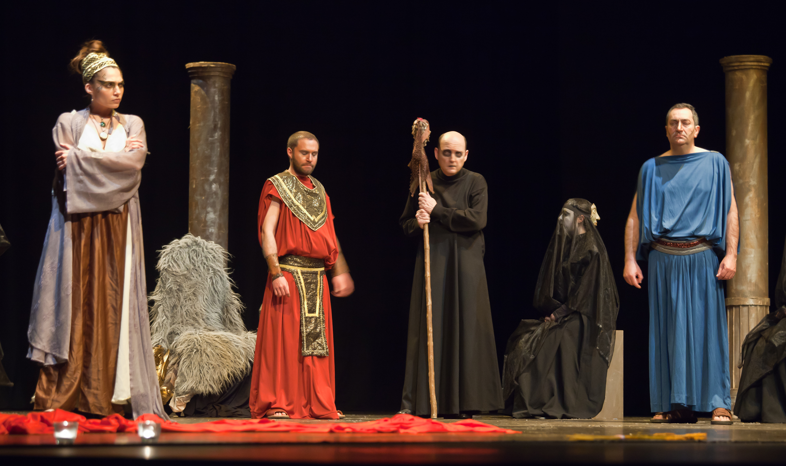 Festival de Lugo 2011 organizado por SEECGalicia. Grupo S.V. Producciones de Madrid, dirixido por Susana Verdú.